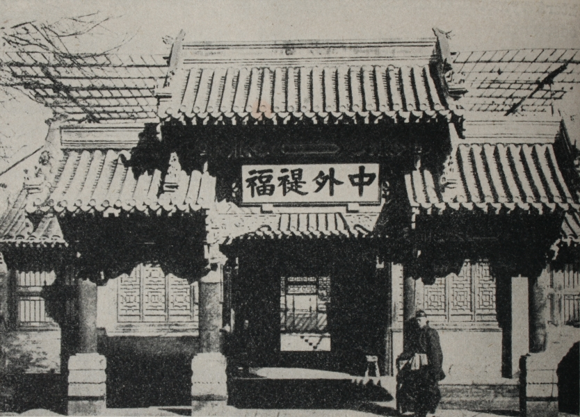 Fotografie E. S. Vráze z knihy Bílý ďábel v Pekingu - Palác ministerstva vnitra v Pekingu, za jehož zdmi se neoficielně připravovalo boxerské povstání.